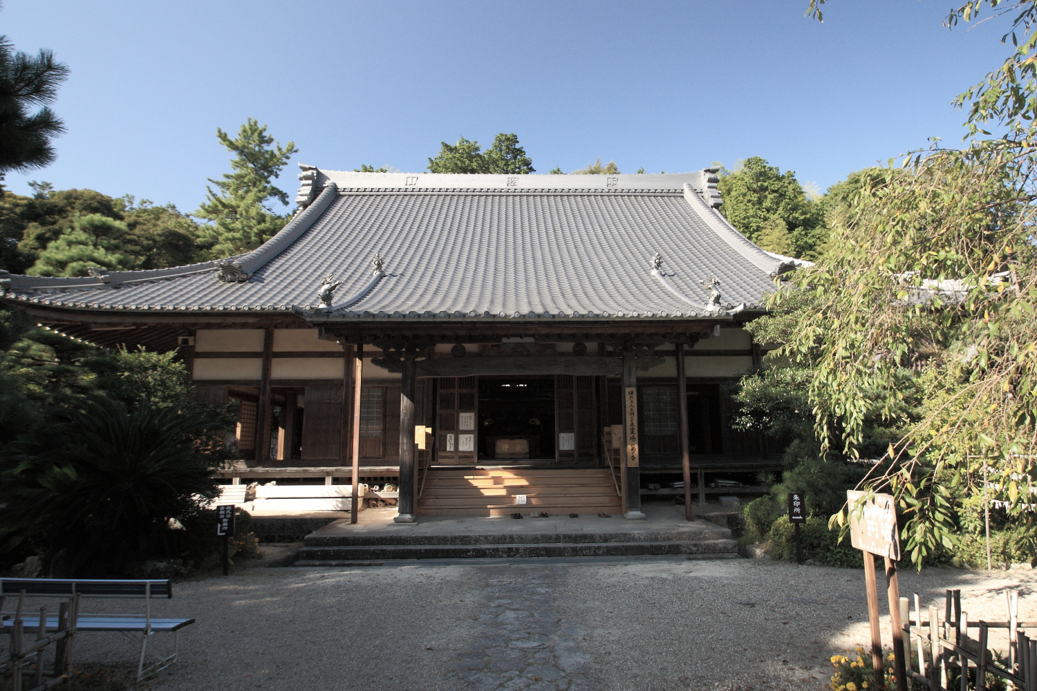 高月院本堂（豊田市松平町、2009年）